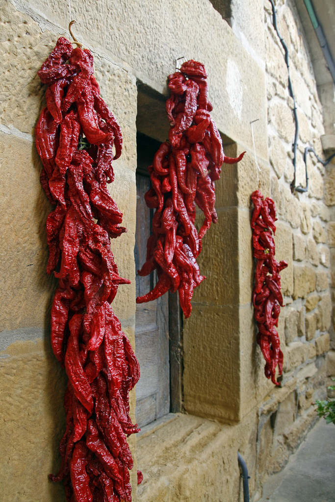 La gastronomía es otro de sus muchos atractivos. En la imagen, los tradicionales pimientos choriceros